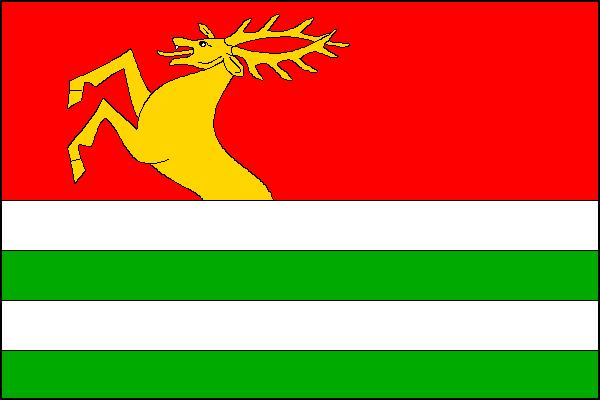 Vlajka obce Benešov